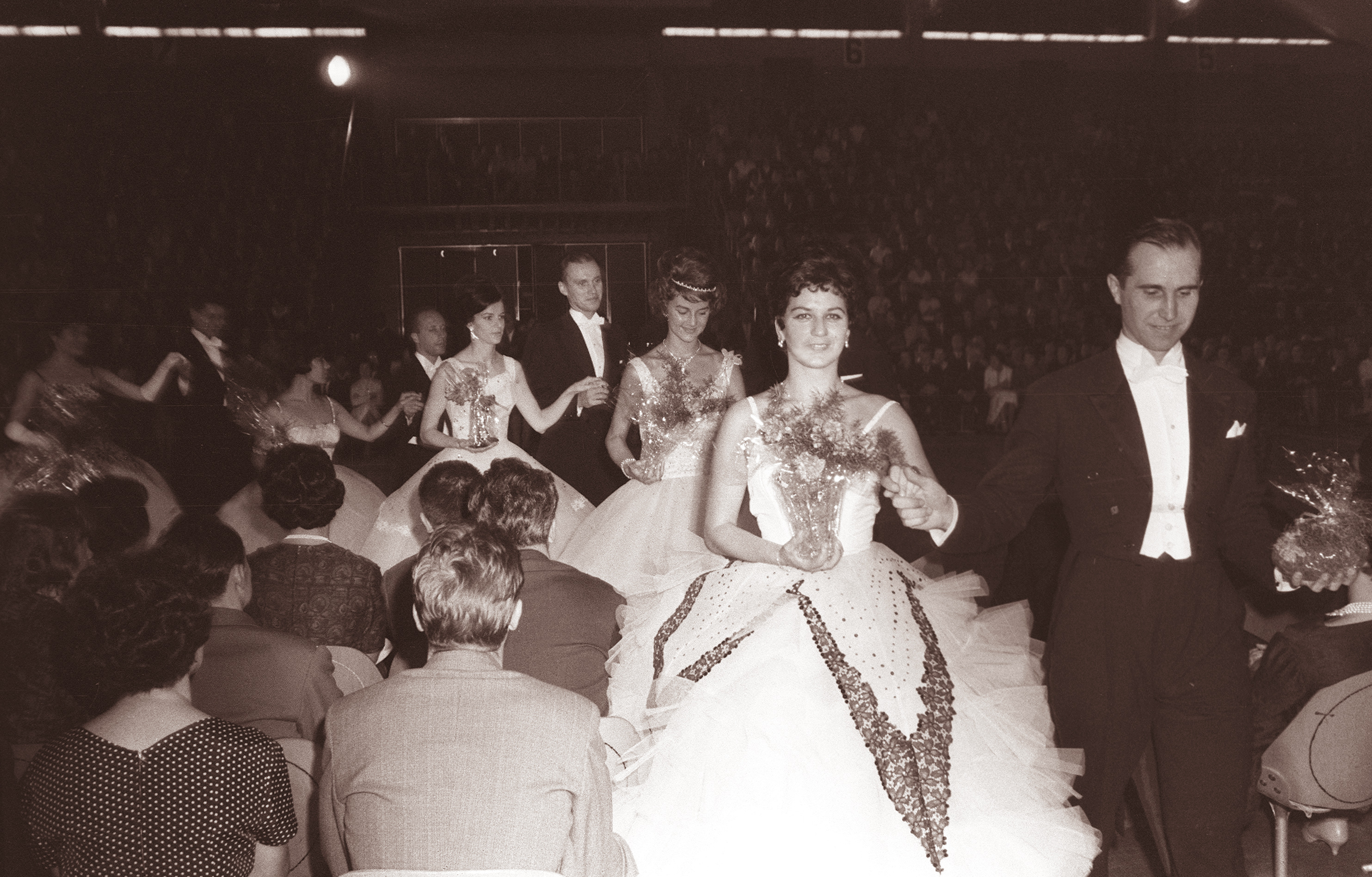 Evropsko prvenstvo v standardnih plesih v Ljubljani